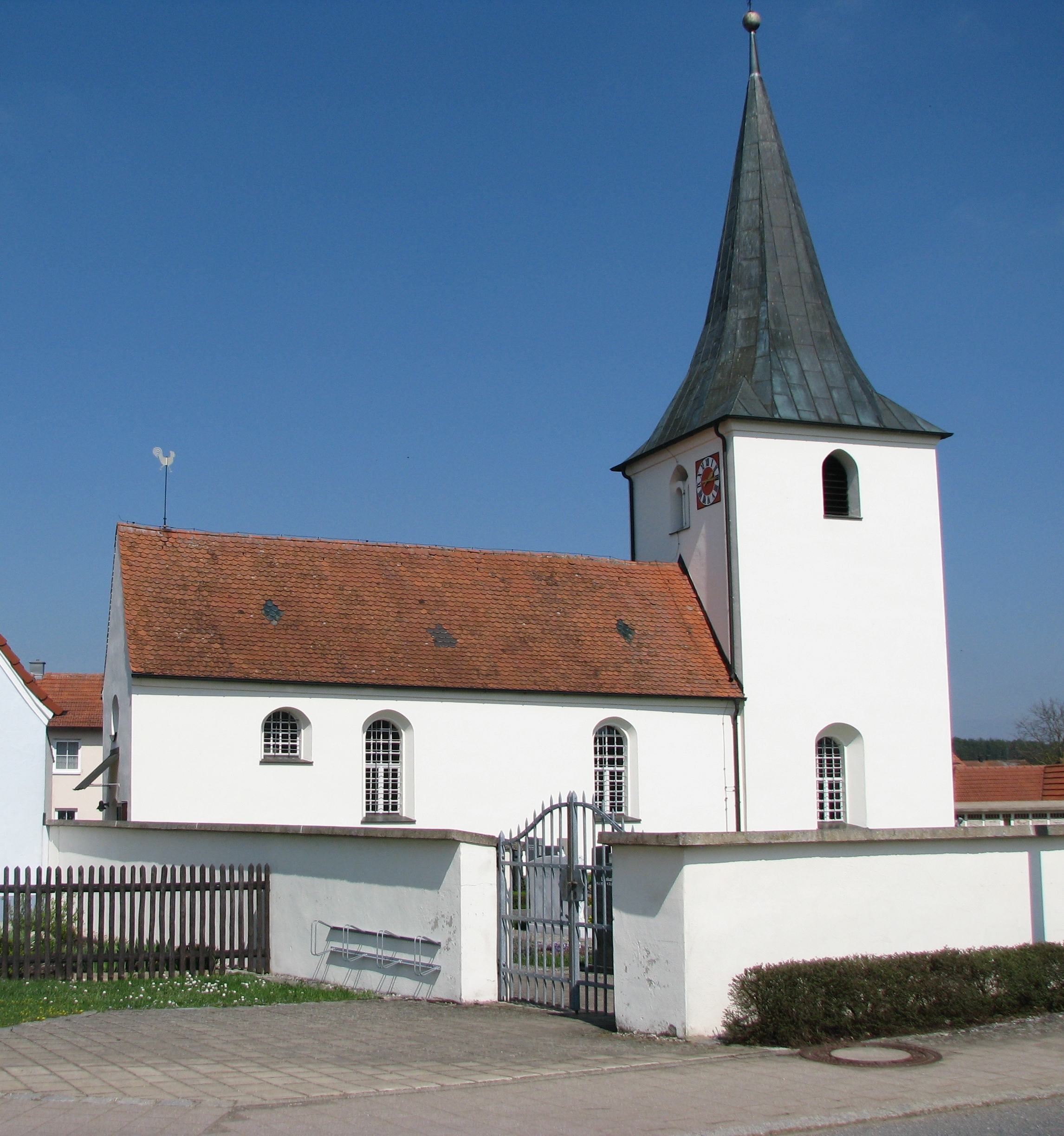 Rocksdorf, Ortsteil von Mühlhausen im Landkreis Neumarkt in der Oberpfalz, evangelische Dorfkirche St. Elisabeth